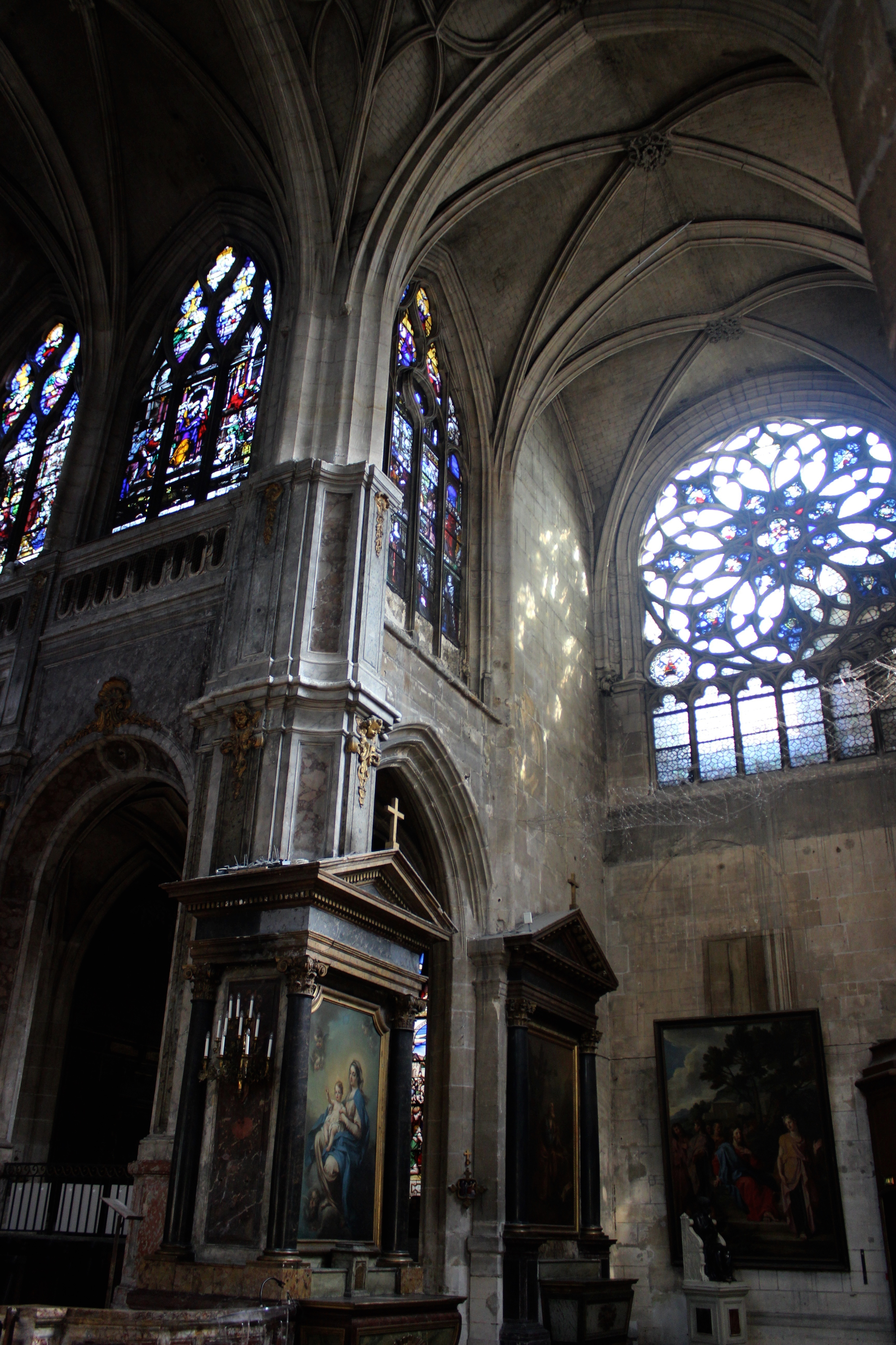 París. Iglesia de Saint Merri. Interior.